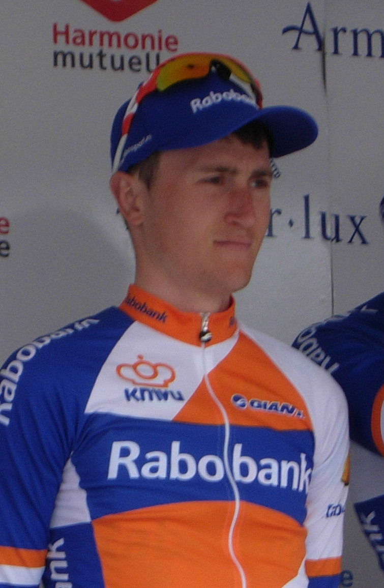 Tour de Bretagne 2013 - Nick van der Lijke lors de la présentation des équipes au départ de la deuxième étape à Ploemel